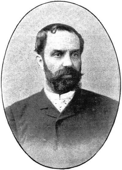 "M. Devès".